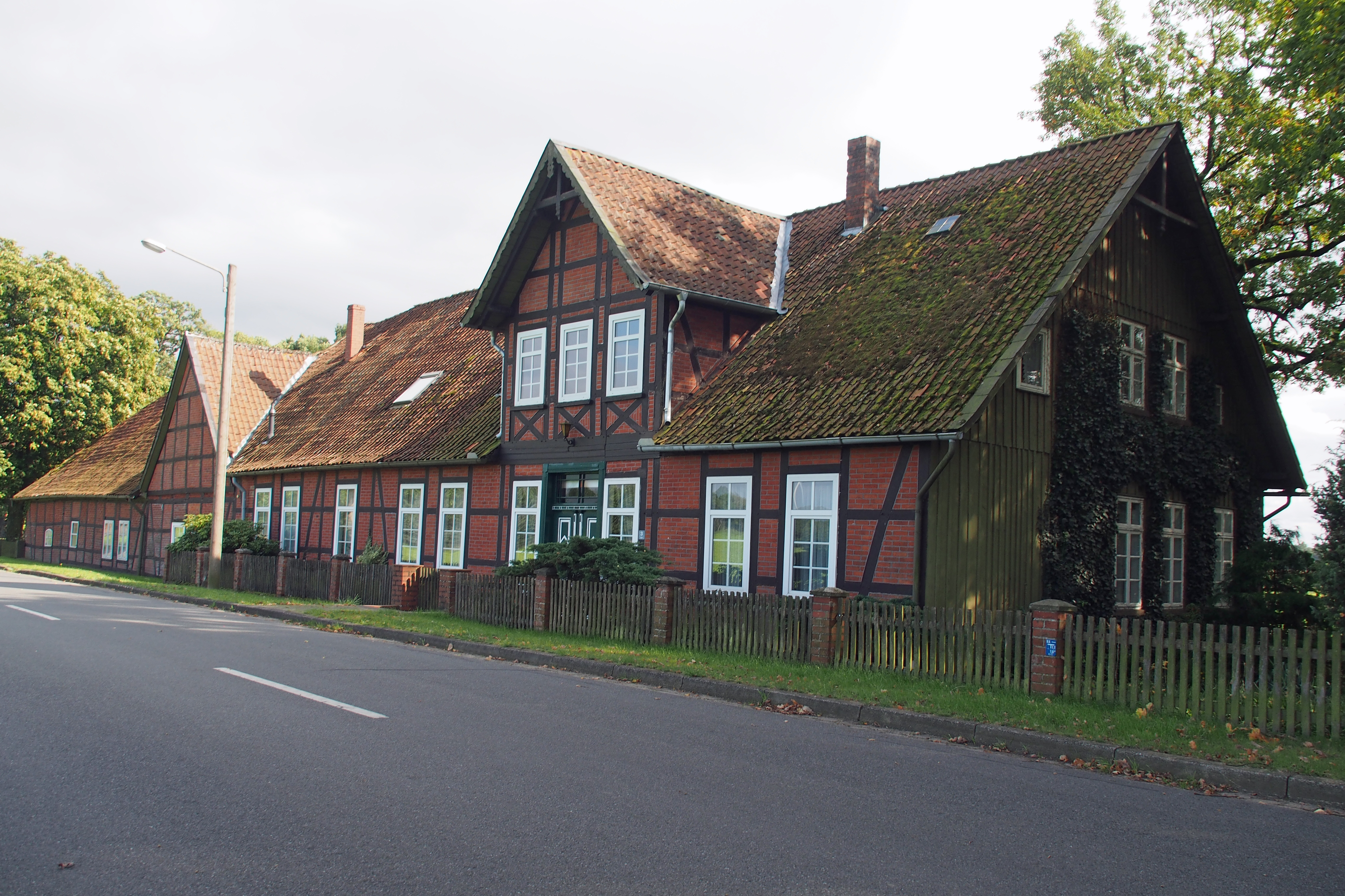 Bauernhof Nr. 3, Ortsteil Kragen, Dorf Scharnhorst, Gemeinde Eschede (Niedersachsen)